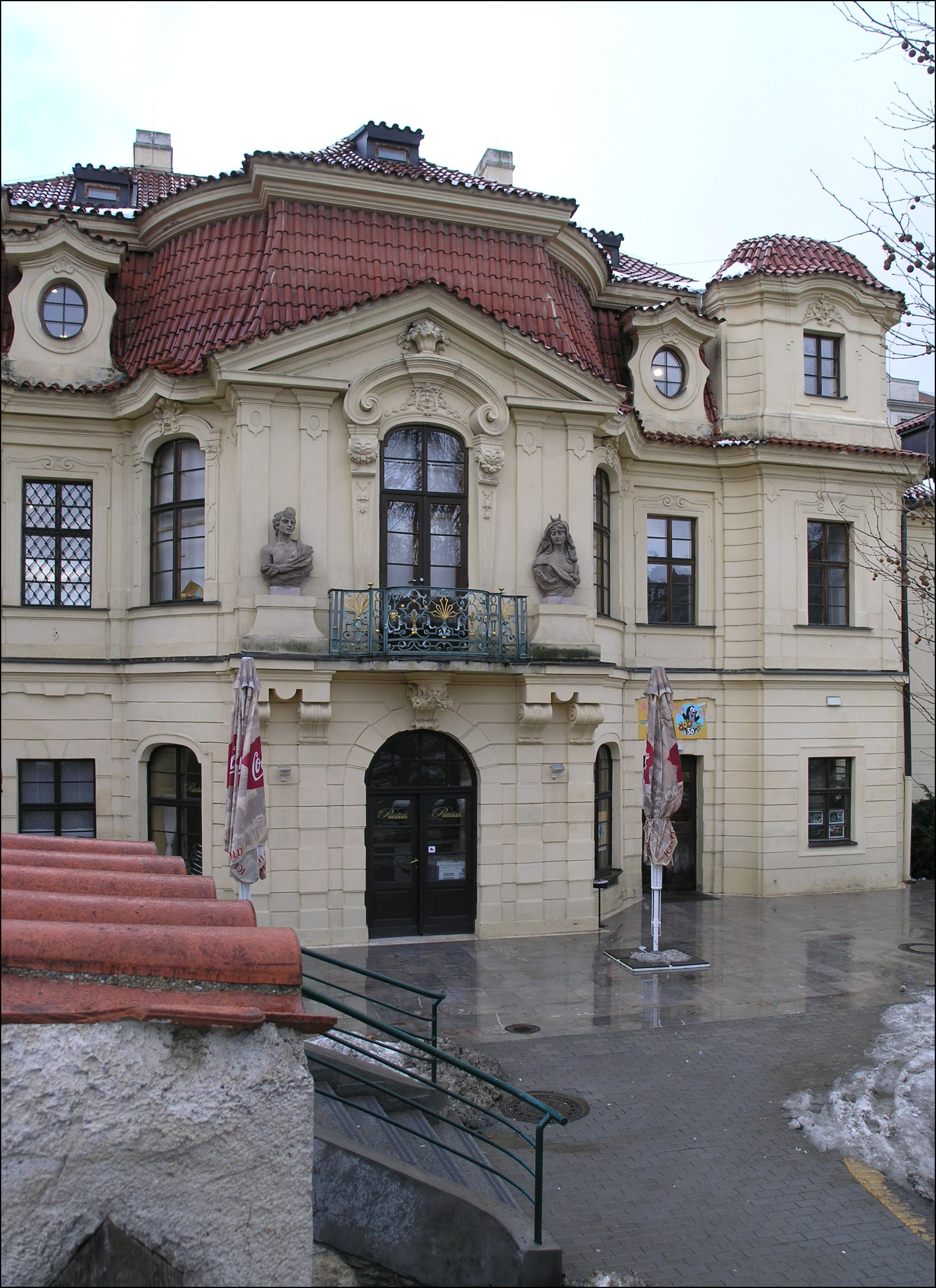 vila Portheimka